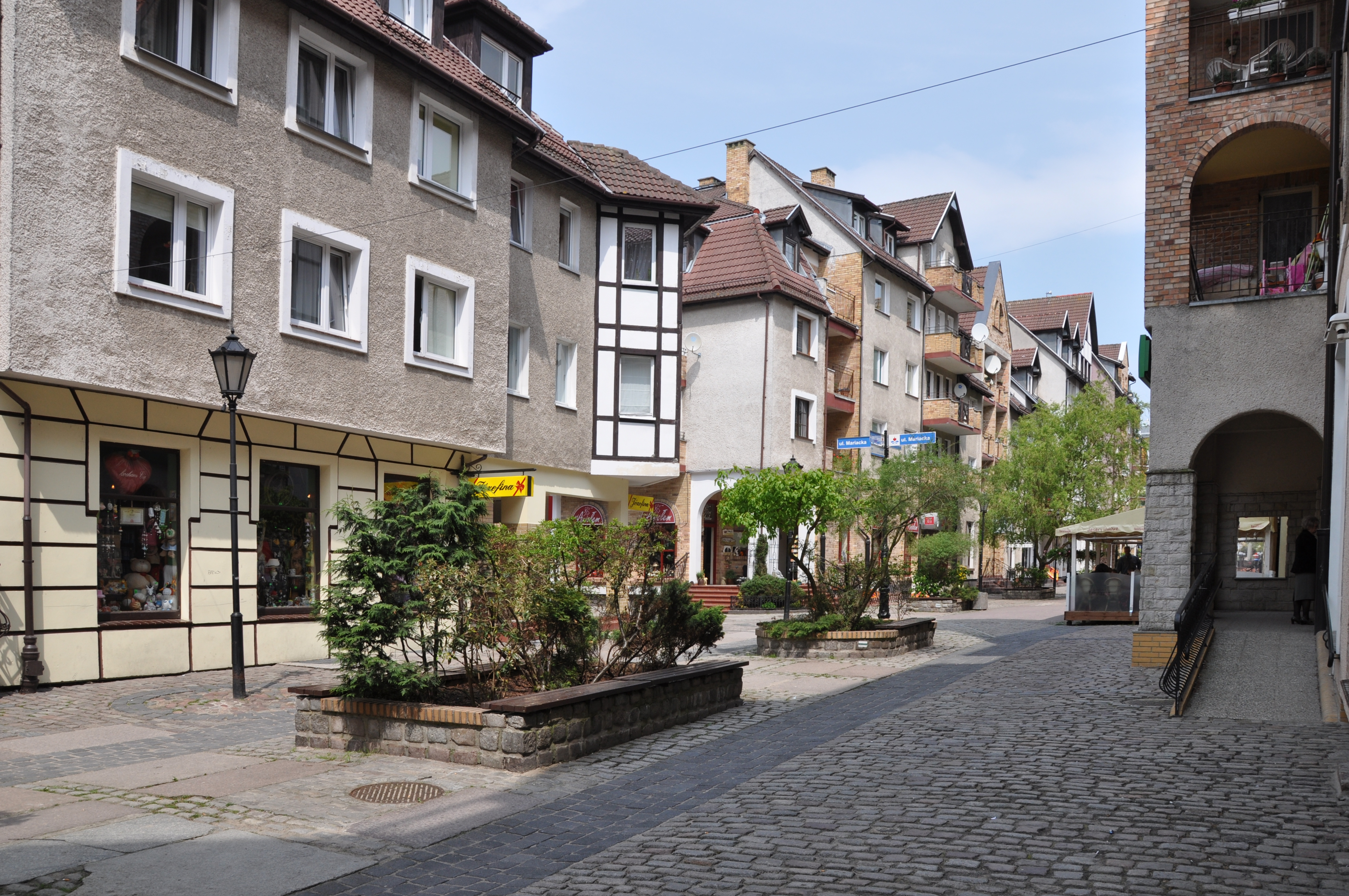 Ulica Emilii Gierczak przy skrzyżowaniu z ulicą Mariacką w Kołobrzegu